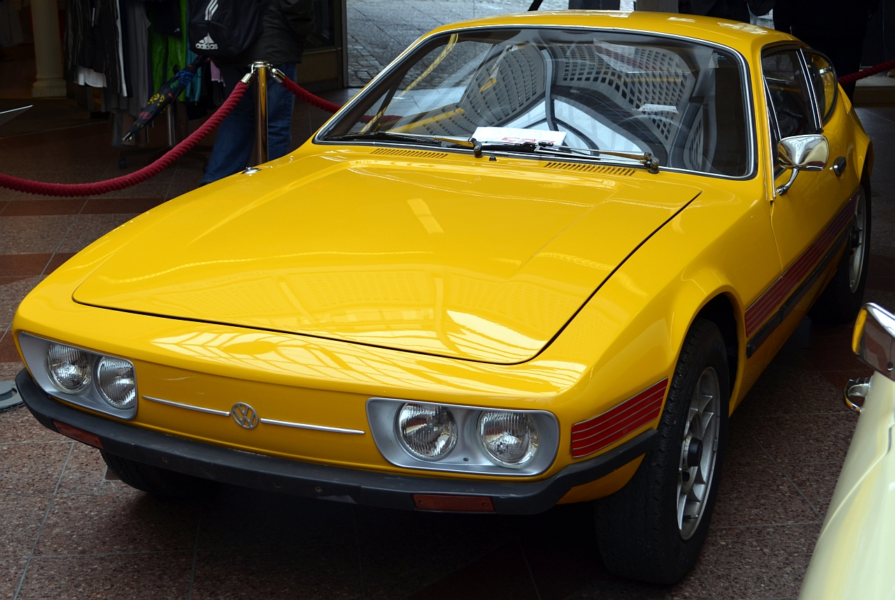 VW SP2